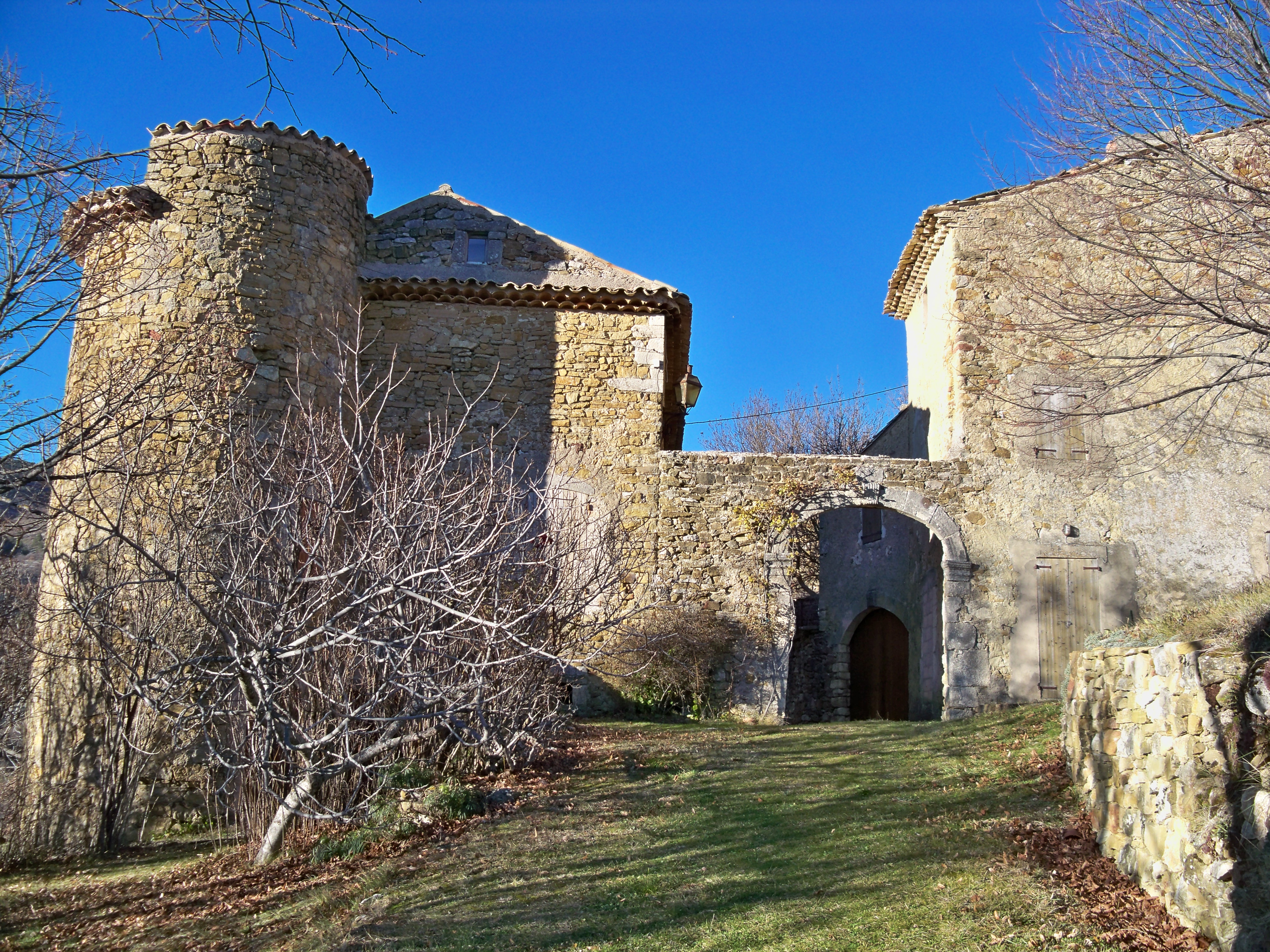 Entrée d'une maison à tour de 1716 à Aurel, Vaucluse, France.